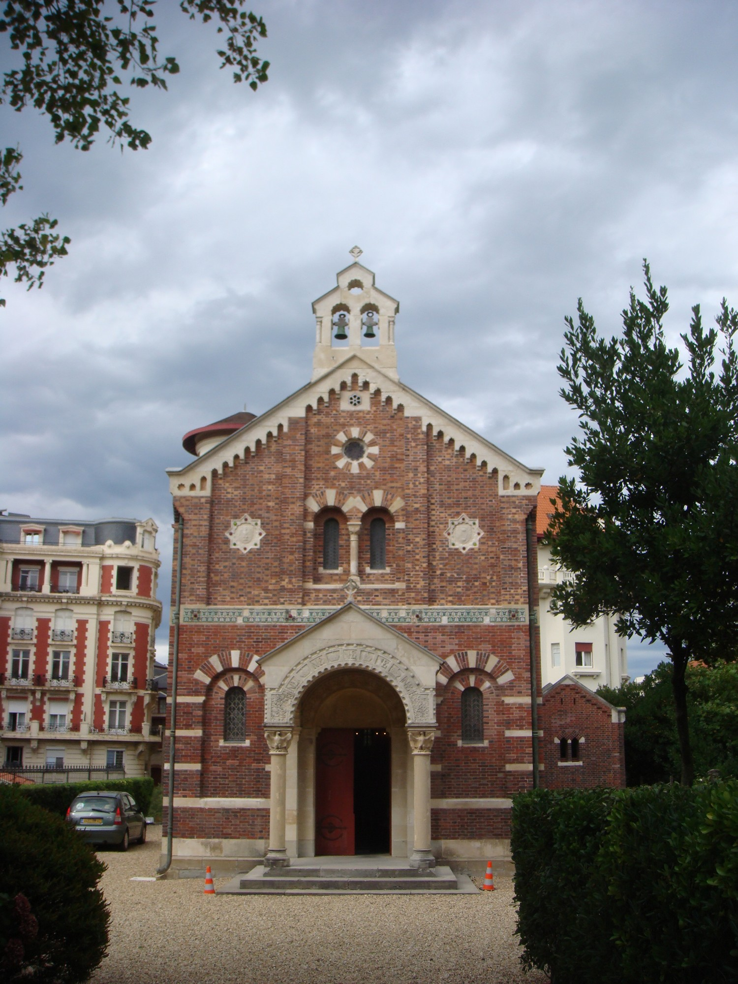 La chapelle impériale est érigée en 1864 à la demande de l'impératrice Eugénie. Il est possible de visiter ce monument de style roman-byzantin et hispano-mauresque.